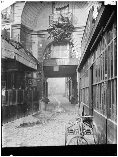 Vue sur cour